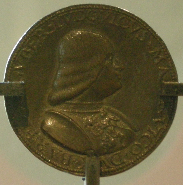 Recto della medaglia con ritratto di Ludovico il Moro (1452-1508), conservata nel medagliere della Pinacoteca del Castello Sforzesco di Milano.